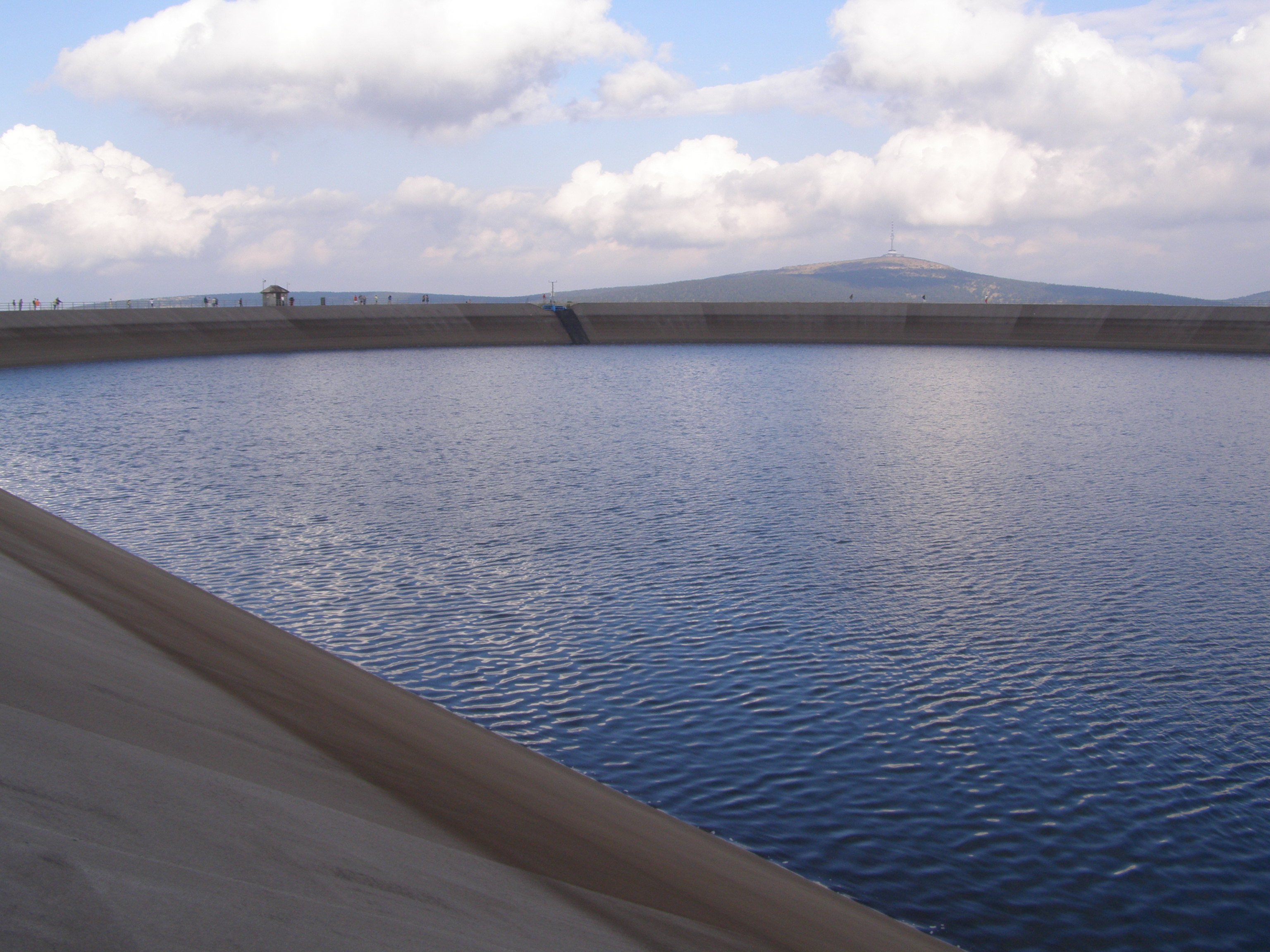 Přečerpávací vodní elektrárna Dlouhé stráně, horní nádrž, v pozadí vrchol Praděd